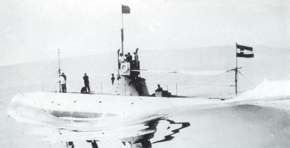 K.u.K. U-5 bei der Erprobung